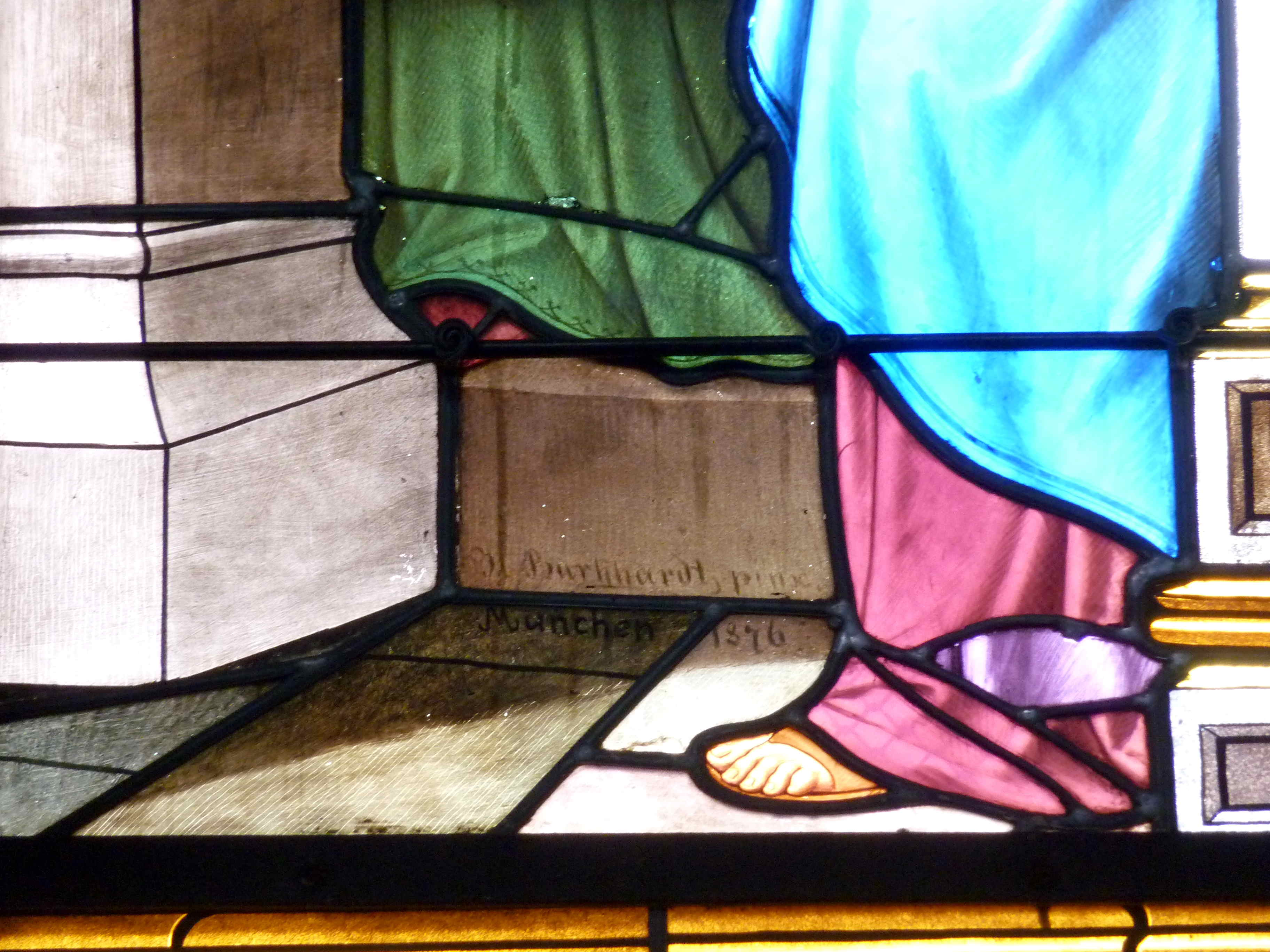 Kirche Saint-Didier in Willer-sur-Thur im Département Haut-Rhin (Elsass/Frankreich), Bleiglasfenster mit Signatur: CH Burckhardt pinx. München 1876, Darstellung: Präsentation im Tempel (Ausschnitt)